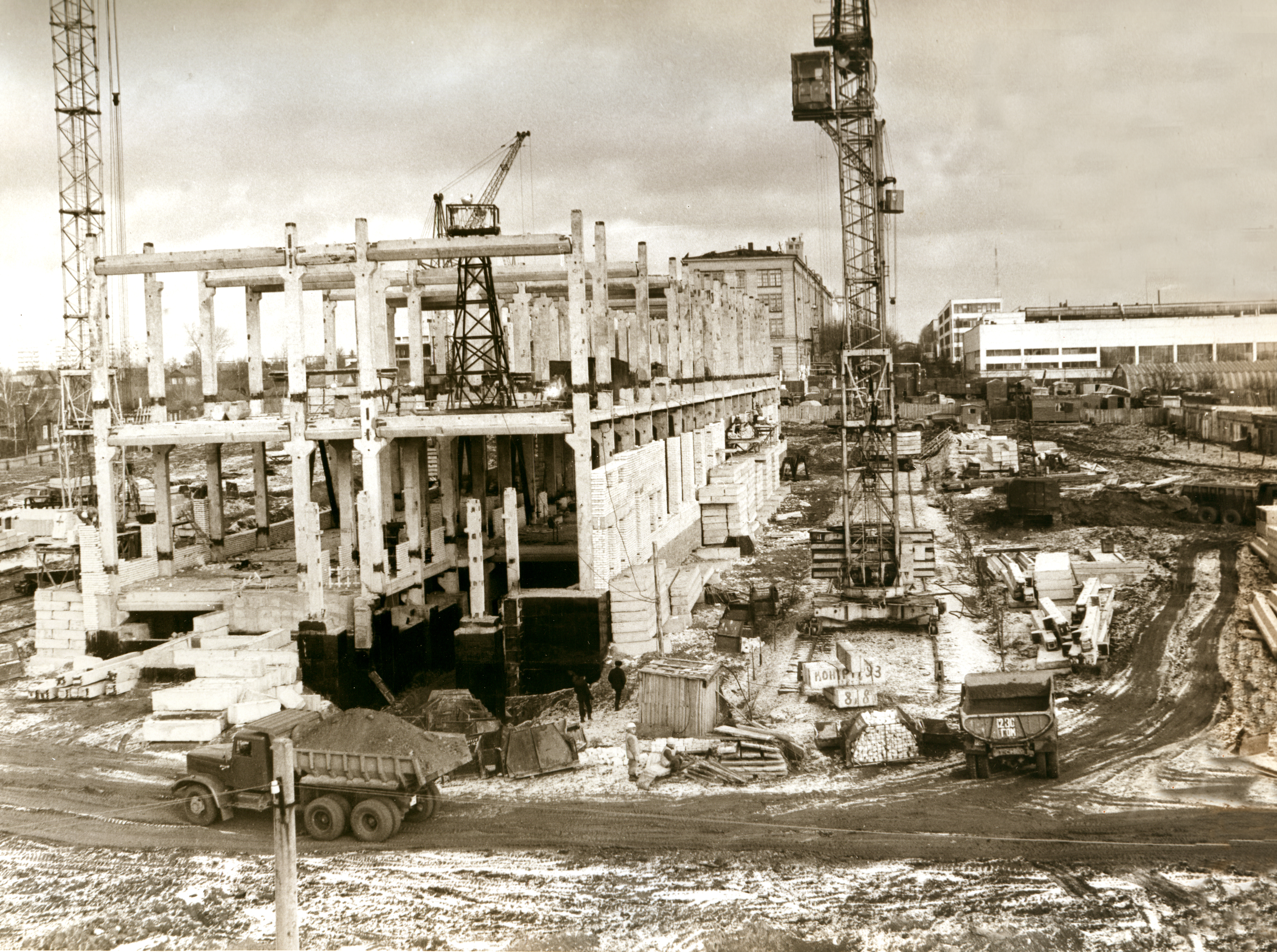 Арзамасский приборостроительный завод строится